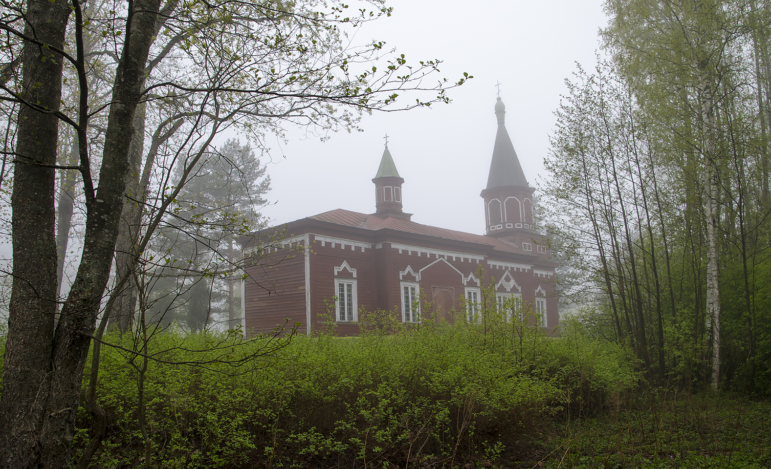 Seliste church